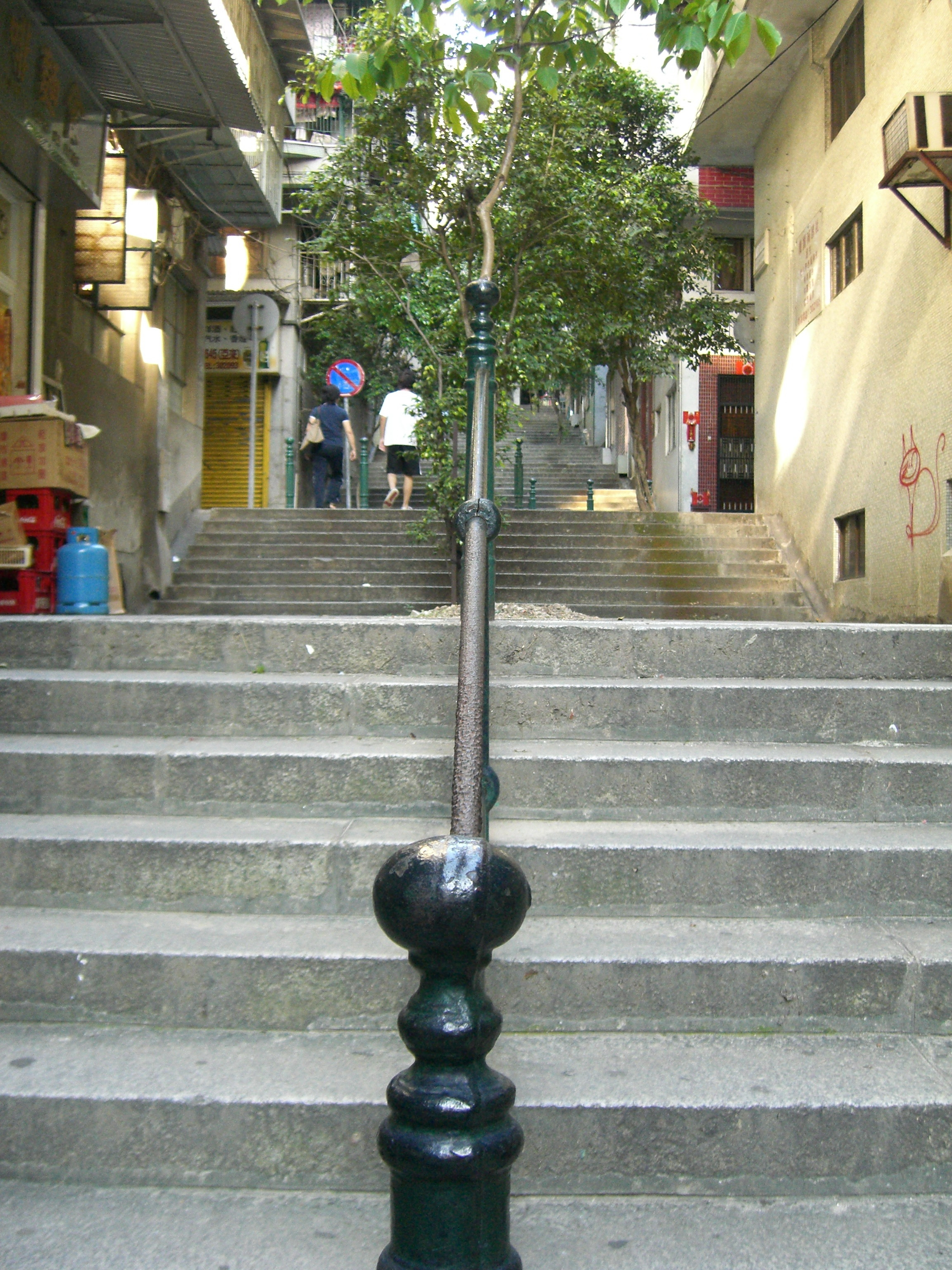 Rua de Tomás da Rosa